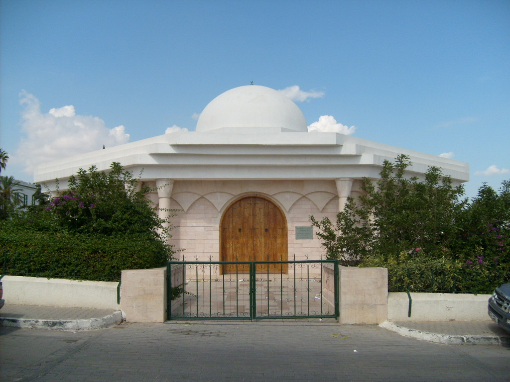 Mausolée de Farhat Hached près de la kasbah de Tunis (Tunisie)